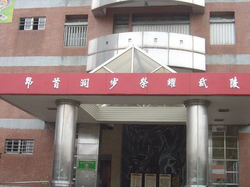 2005年，武陵高中校門標語改成「昂首闊步，榮耀武陵」，曾引發在校生及校友大力反彈。